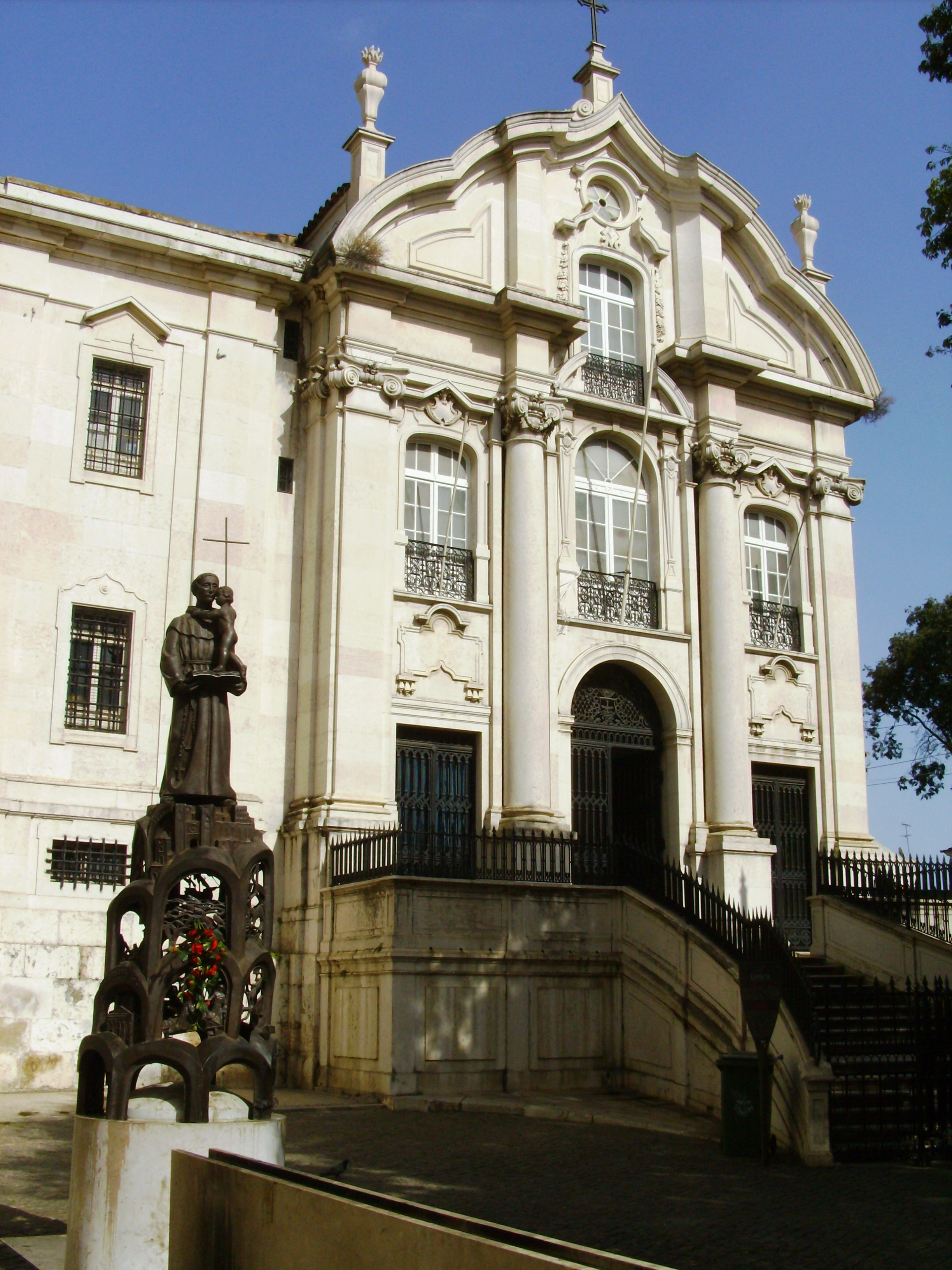 Igreja de Santo António, Lisboa, Portugal.